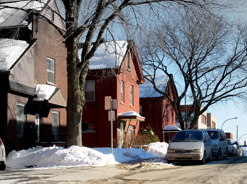 Quartier ouvrier rue Island à Sherbrooke, Québec